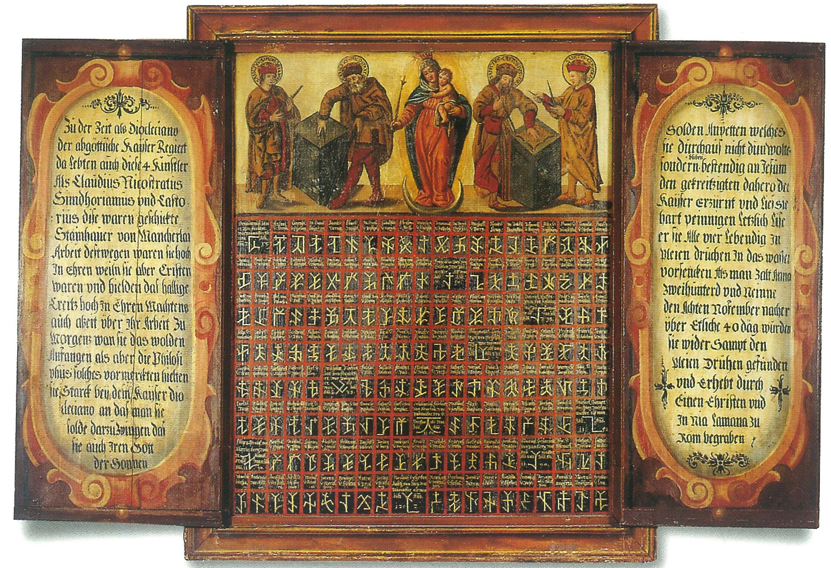 Tabernakel2